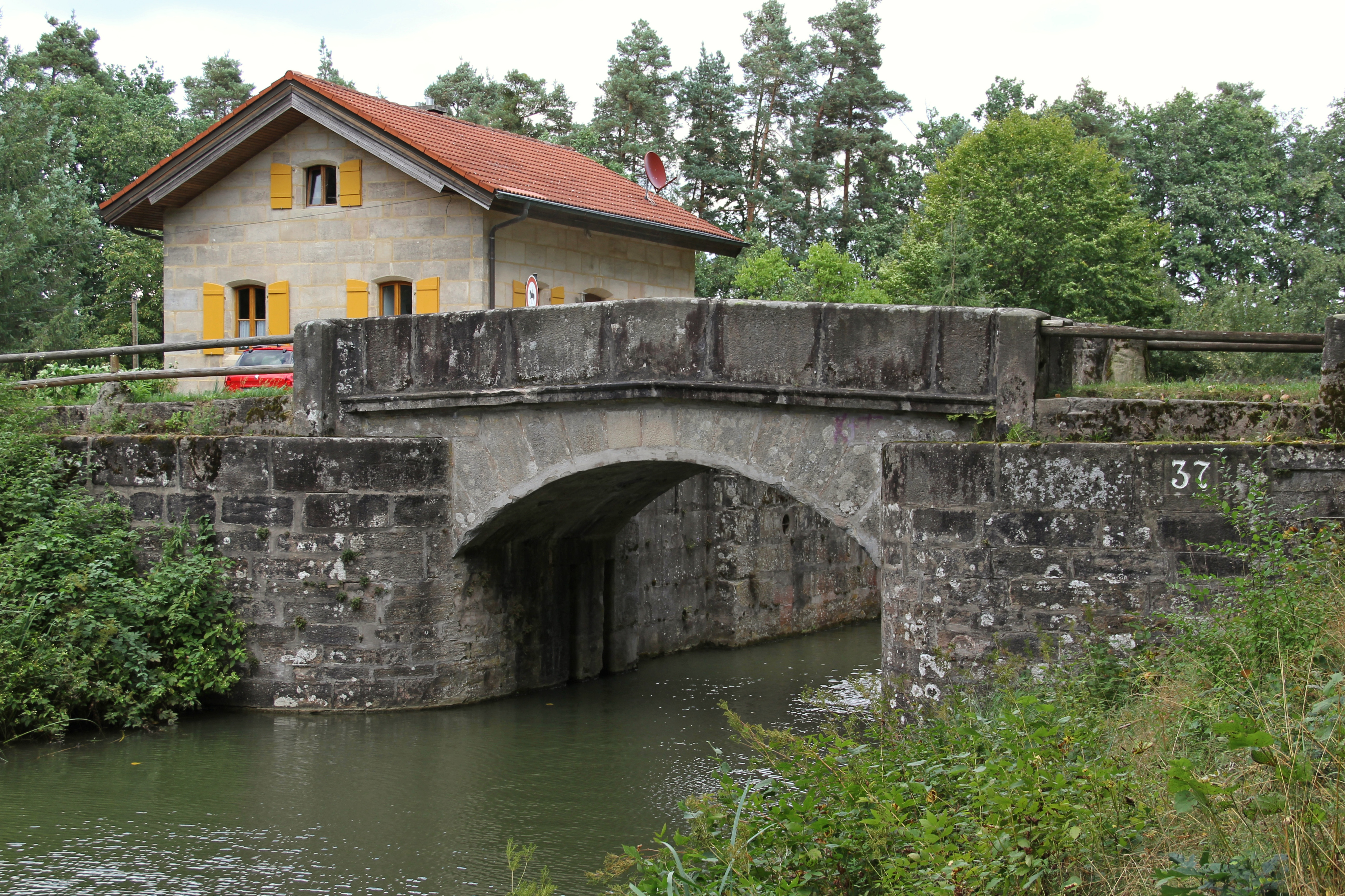 Schleuse 37, Ludwig-Donau-Main-Kanal